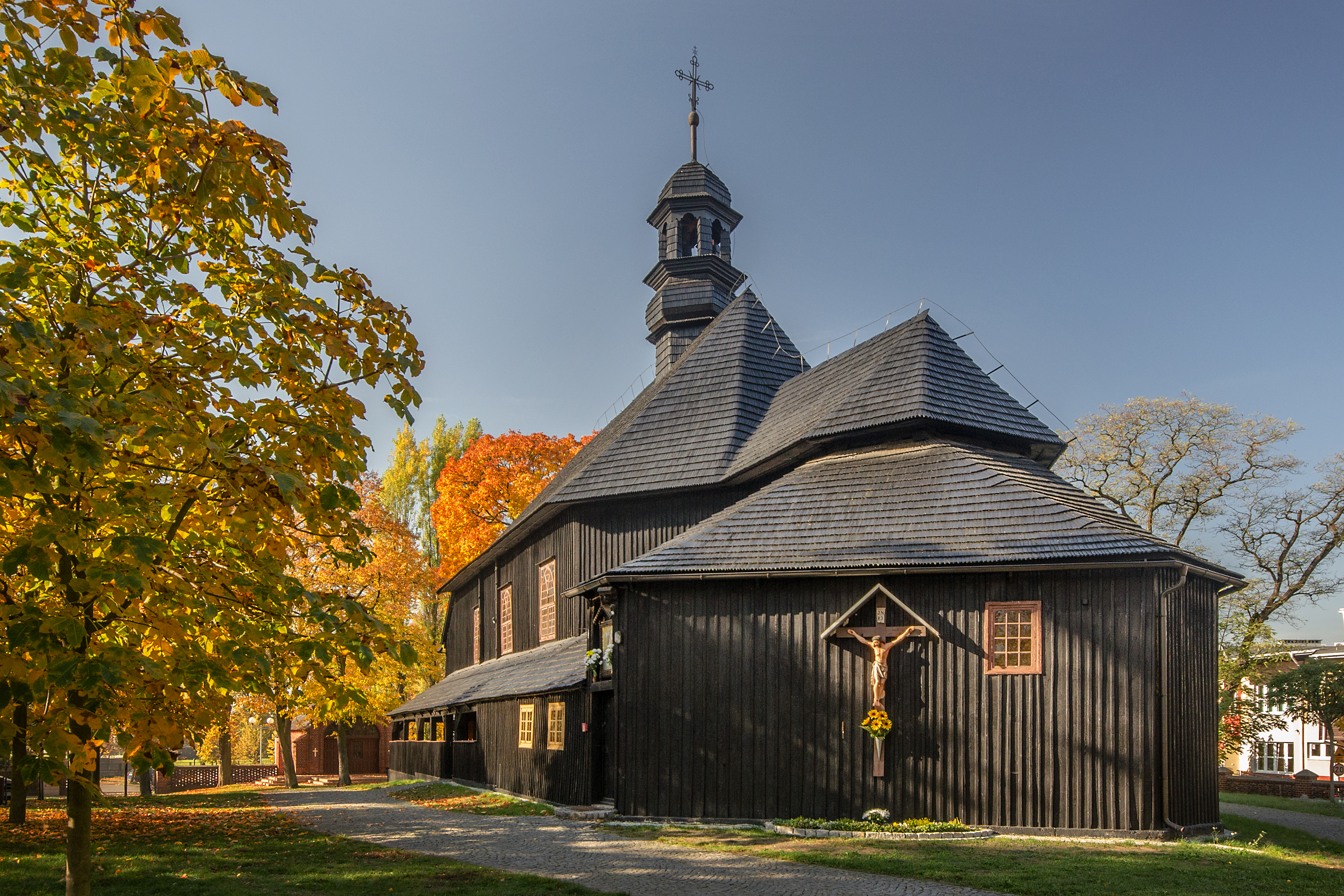 Dobrzeń Wielki, kościół odpustowy p.w. św. Rocha, 1658, 1752, 1928, 1958